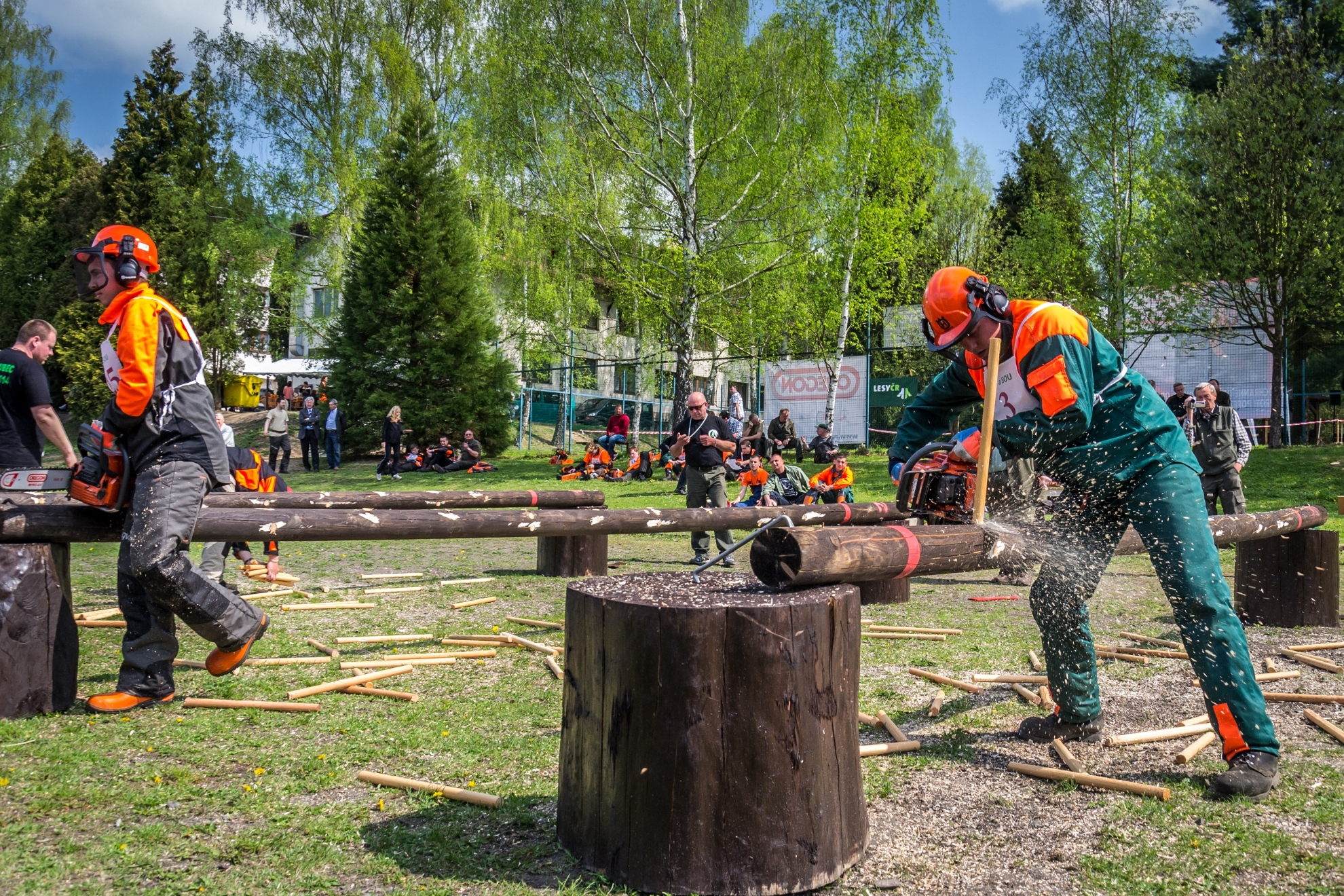 Mezinárodní dřevorubecká soutěž Dřevorubec junior